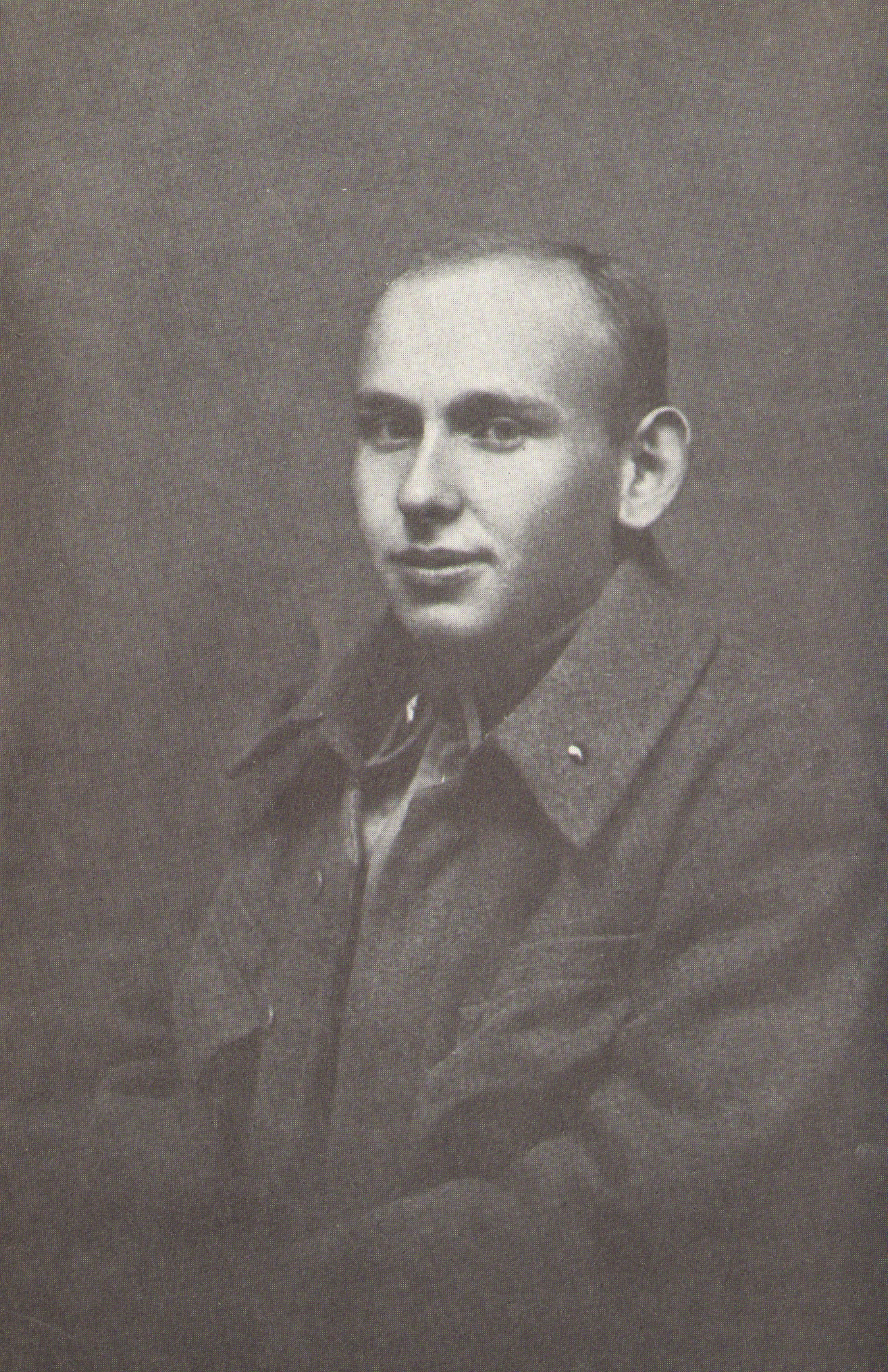 Hanns Eisler als Einjährigfreiweilliger des österreichisch-ungarischen Heeres, 1917.